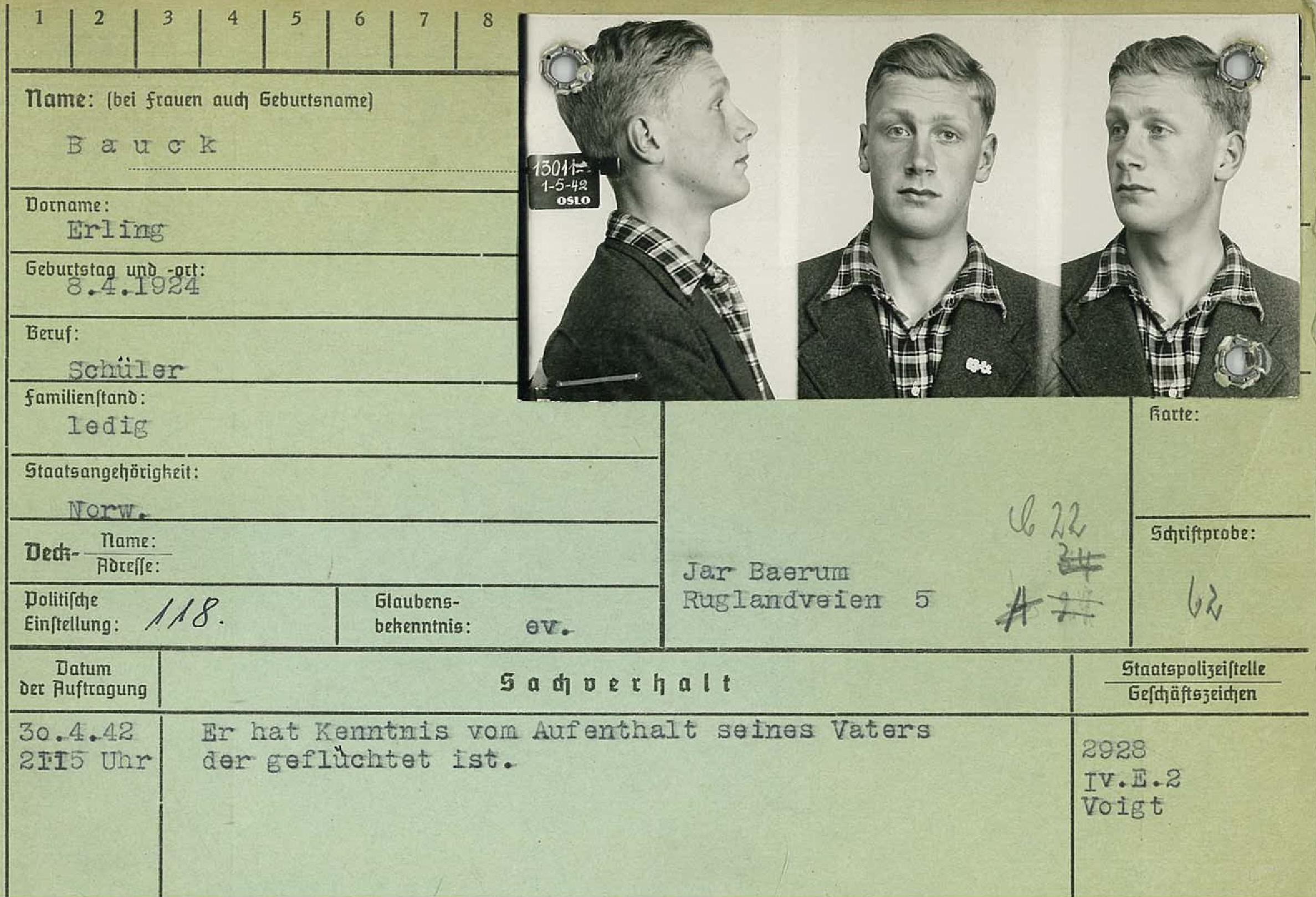 Fangekort laget i forbindelse med arrestasjon.